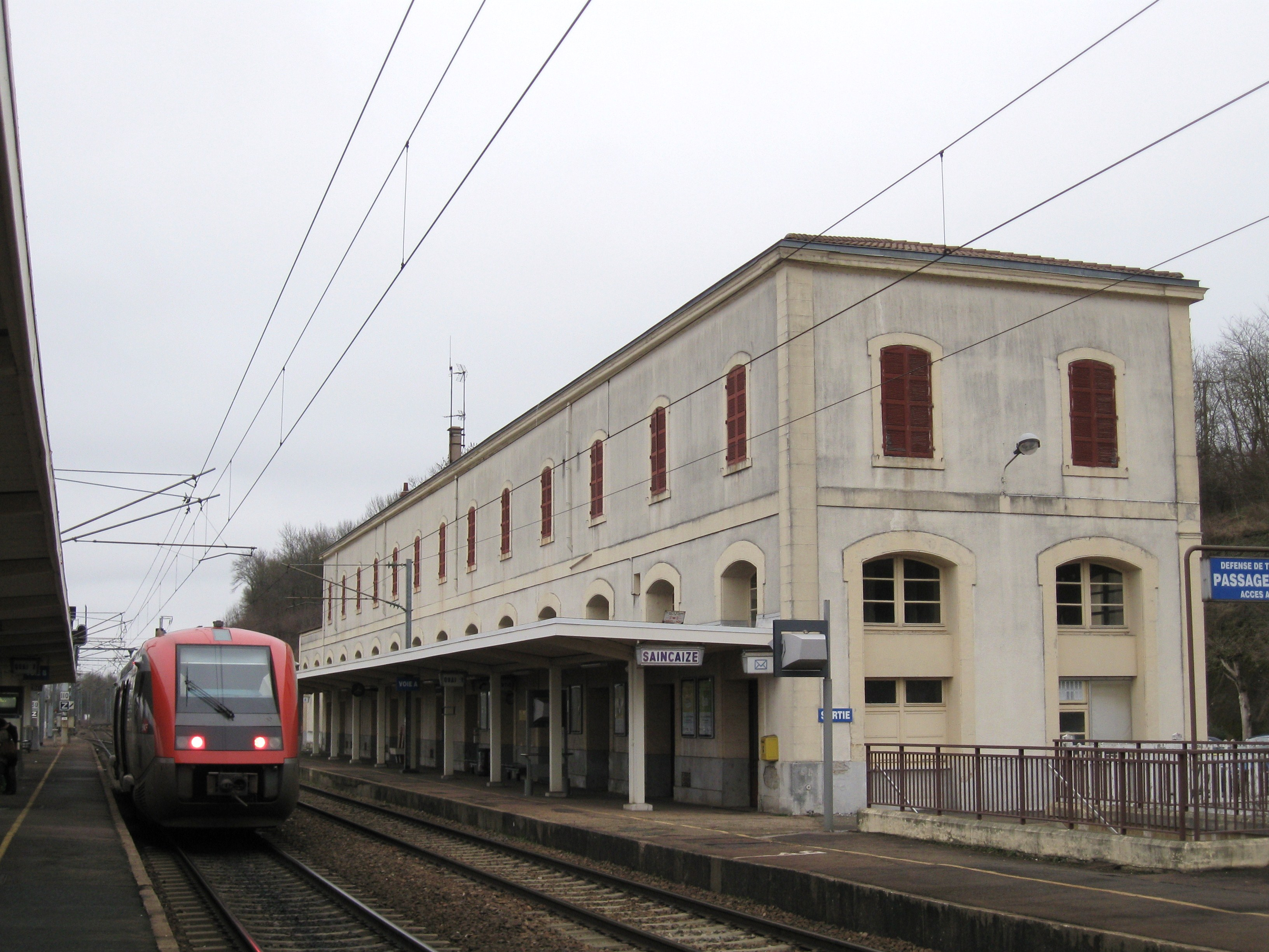 Gare de Saincaize, Nièvre, France, automotrice diesel de la série X 75000 (TER Bourgogne)